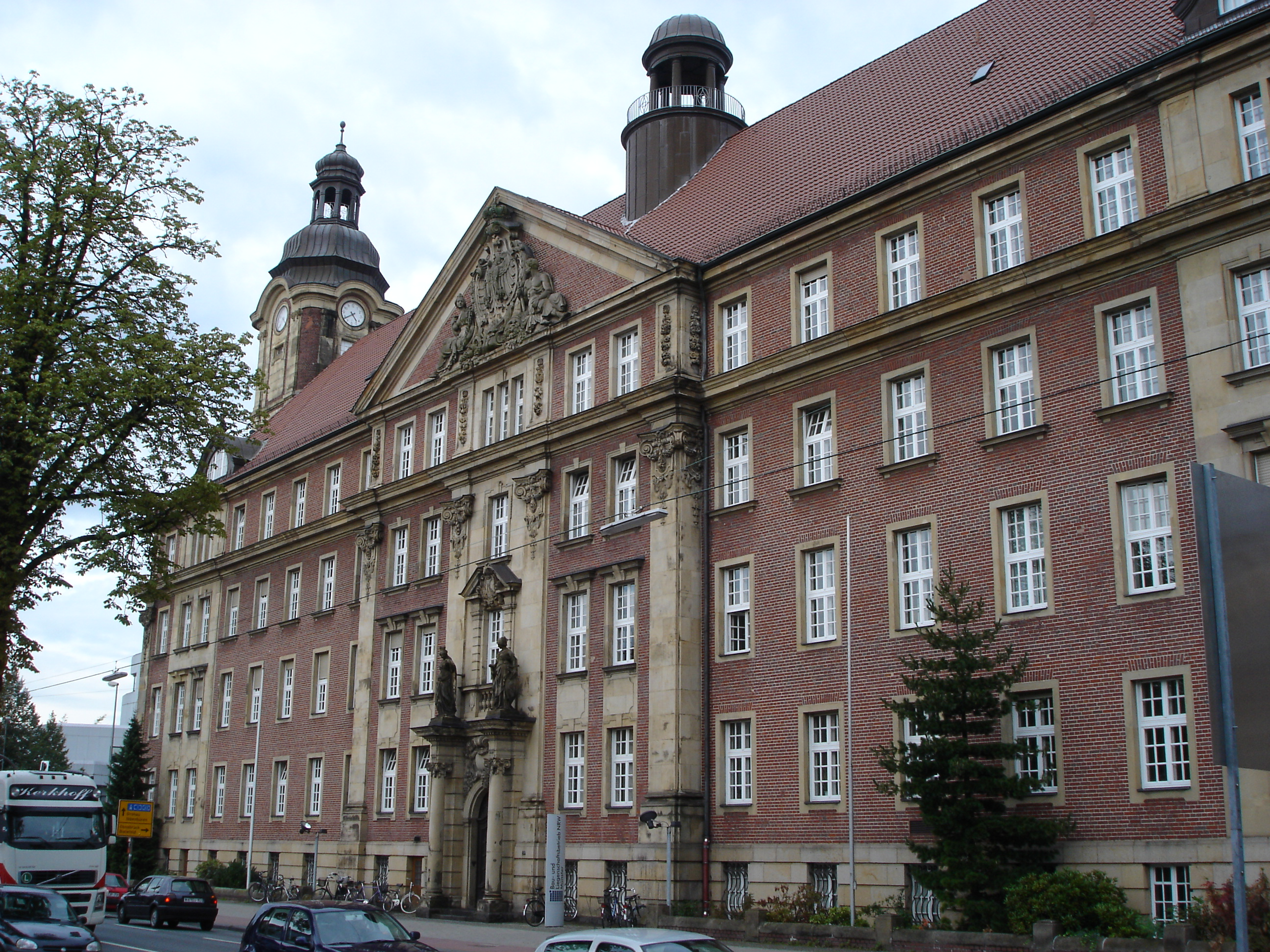 Gebäude der Finanzbehörden in Münster, Westfalen; Westfassade am Hohenzollernring mit Hauptportal, von Südwesten gesehen; erbaut 1912-1914 für die Oberfinanz- und Oberzolldirektion Münster, bis 1966 Sitz der Oberfinanzdirektion Münster; unter Denkmalschutz